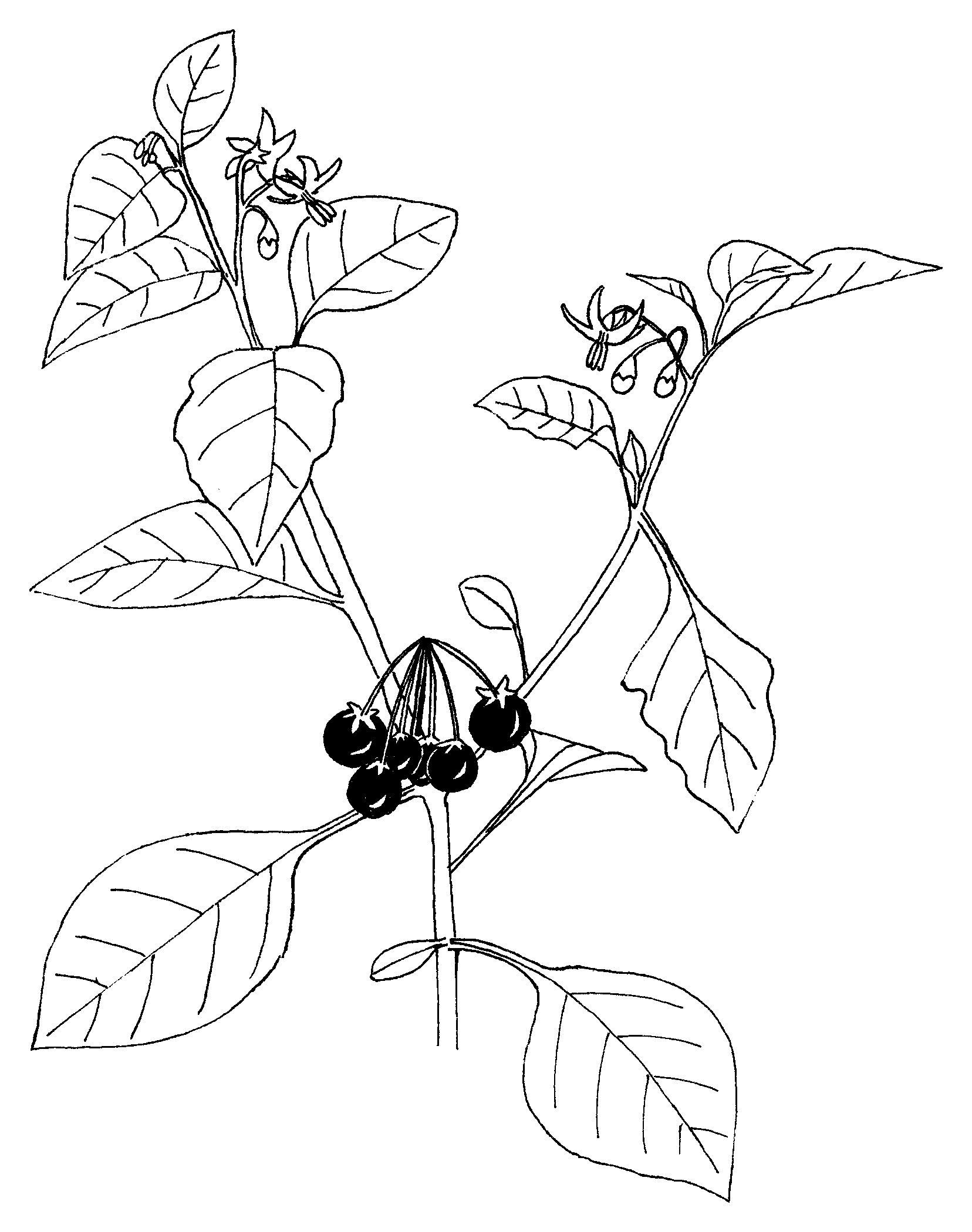 Solanum nigrum, Lage Vuursche, The Netherlands, September 3, 1977 Zwarte nachtschade Pen drawing on paper by Elly Waterman Pentekening op papier door Elly Waterman